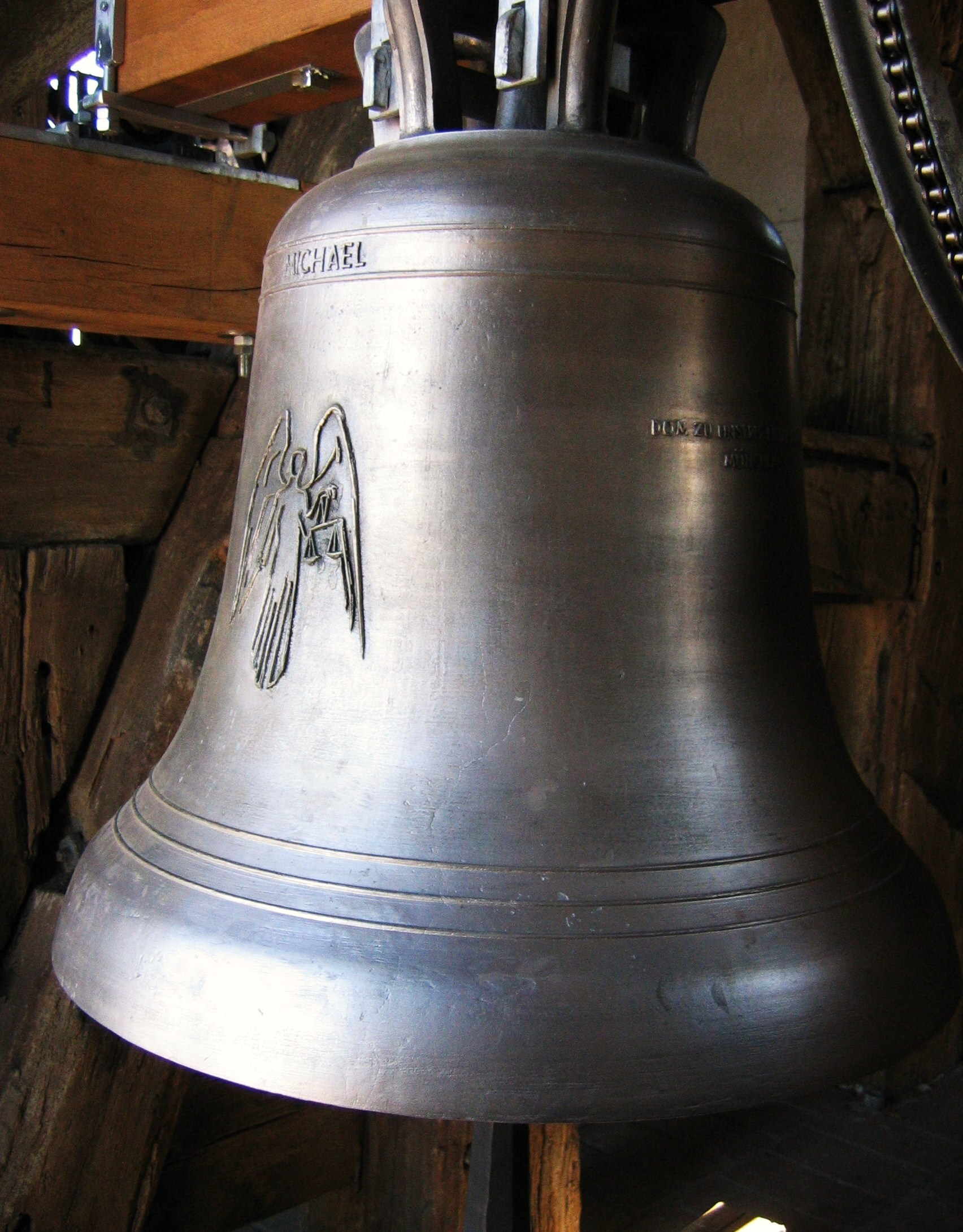 Michaelsglocke (c2) im Frauendom zu München